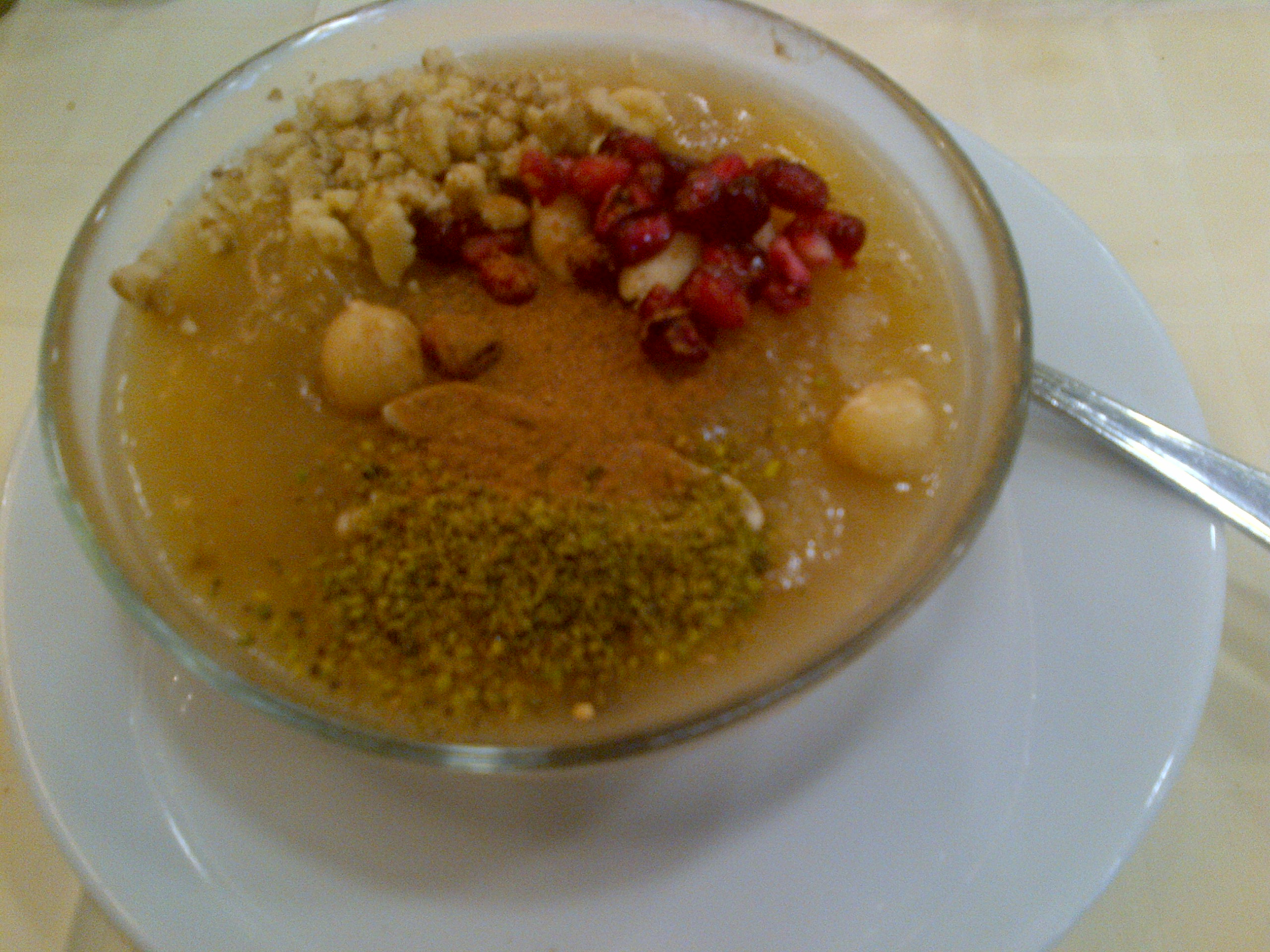 Aşure, un postre de la cocina turca.